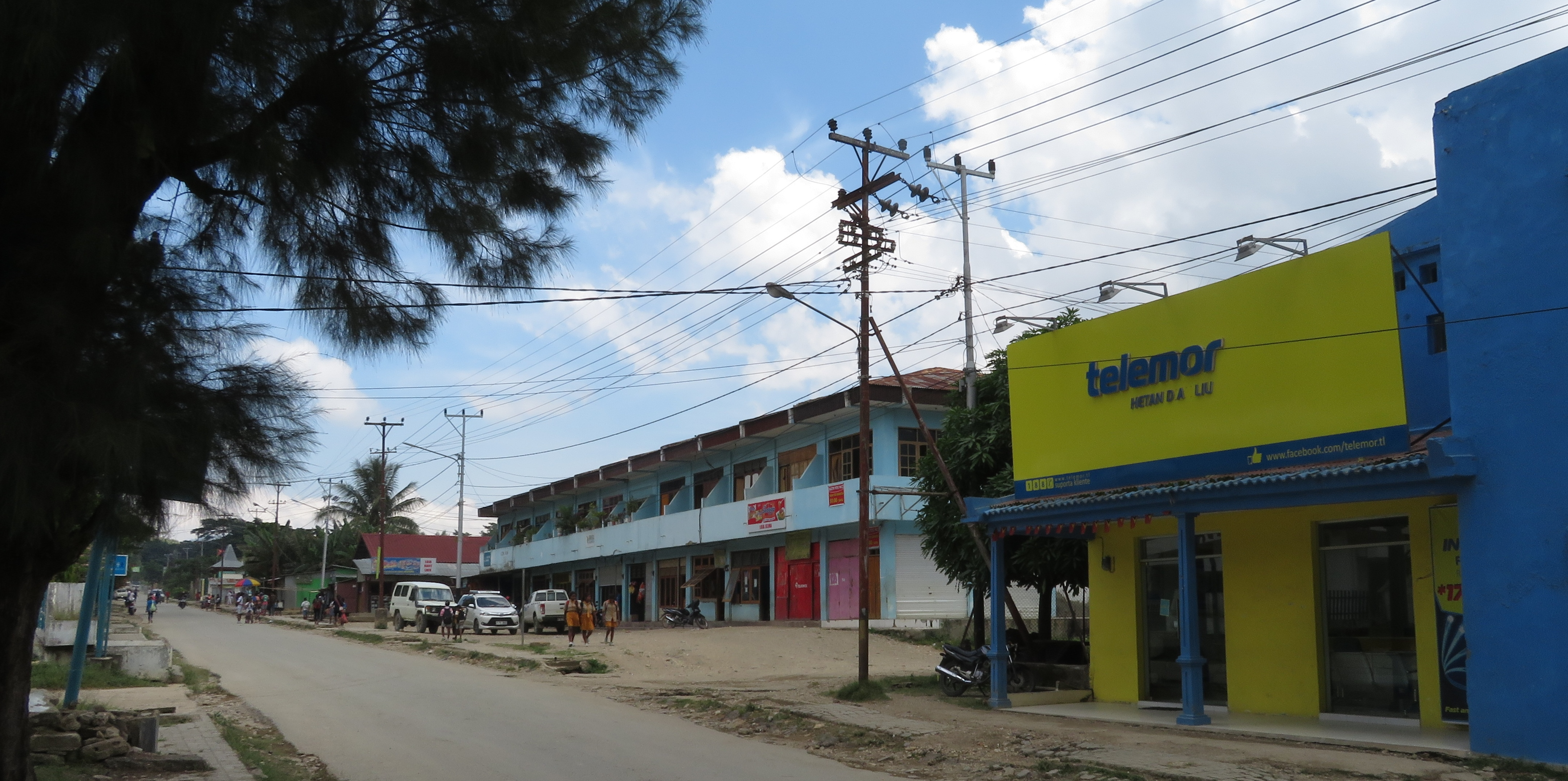 Hauptstraße, Aileu, Timor Leste